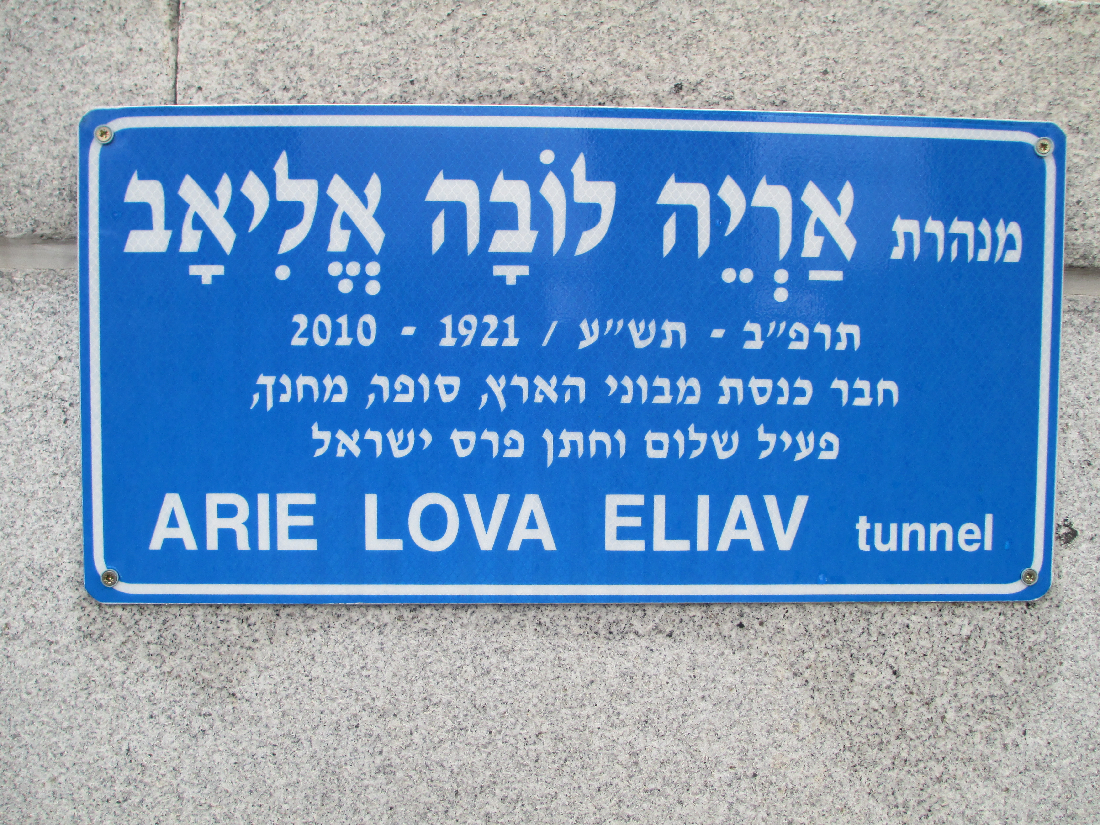 לוחית זיכרון בכניסה למנהרת אריה לובה אליאב ברח' קפלן בתל אביב